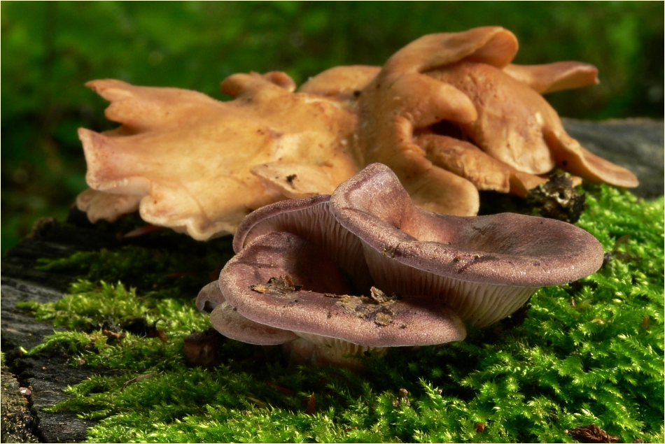 Laubholz-Knäueling (Lentinus torulosus) jung und älter